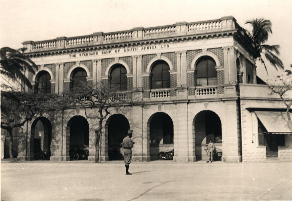 Edifício do Standard Bank